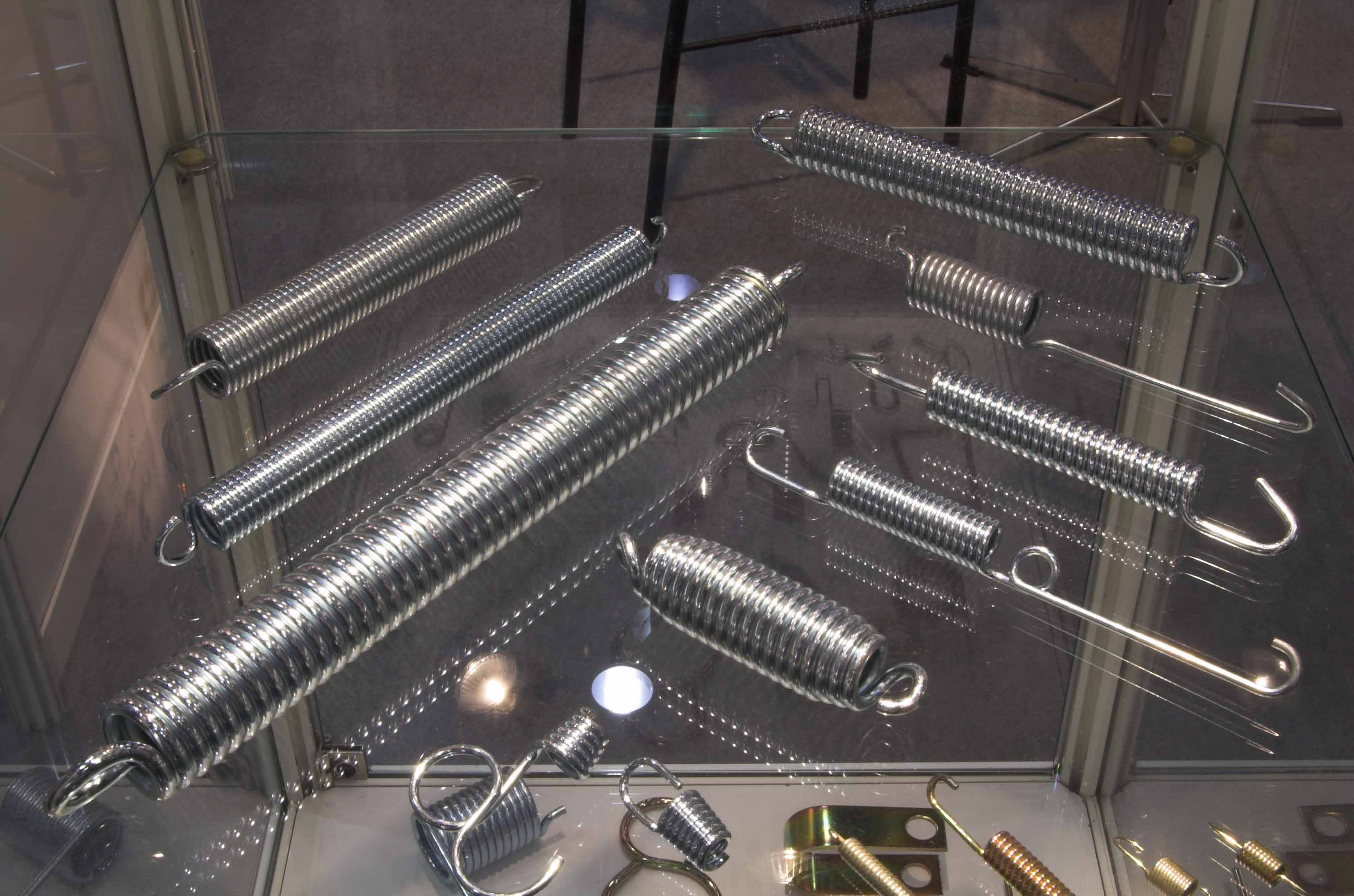 Zugfedern mit verschiedenen Ösenformen_NH-Federn